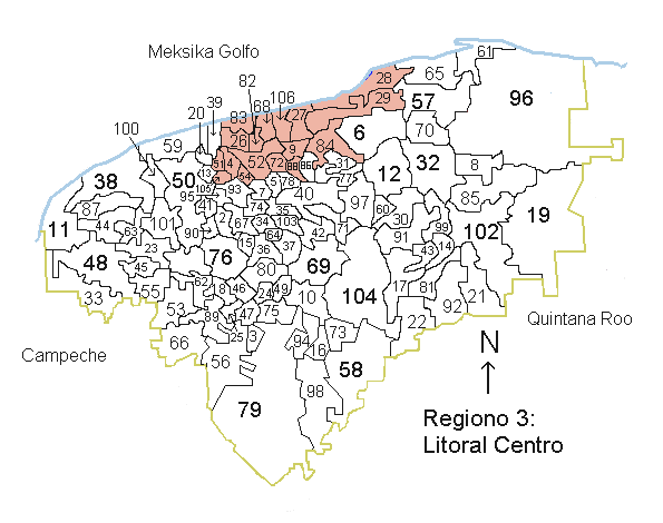 La bildo montras la situon de la regiono 3, Litoral Centro Yucatán Kategorio:Geografio de Yucatán